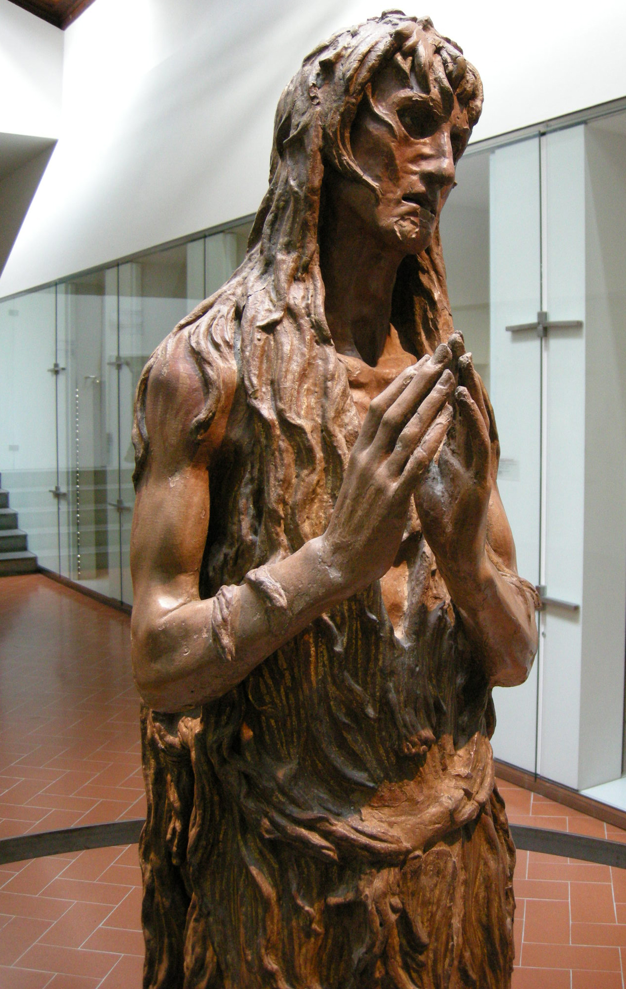 Donatello, maria maddalena